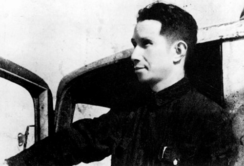 1946年，粟裕指挥苏中七战七捷时